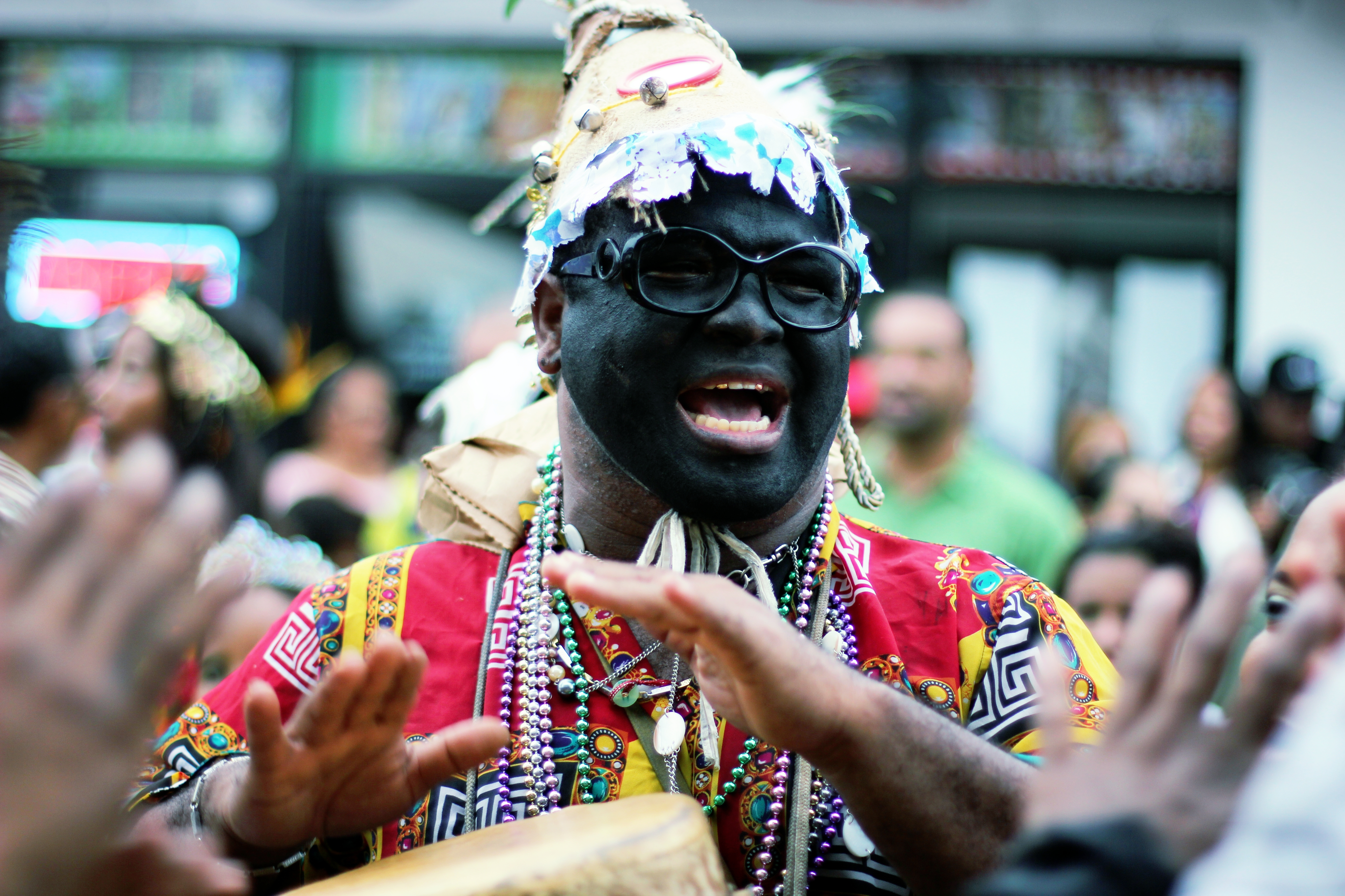 Hombre vestido de Congo en desfile folclórico en Chitré, provincia de Herrera, Panamá.